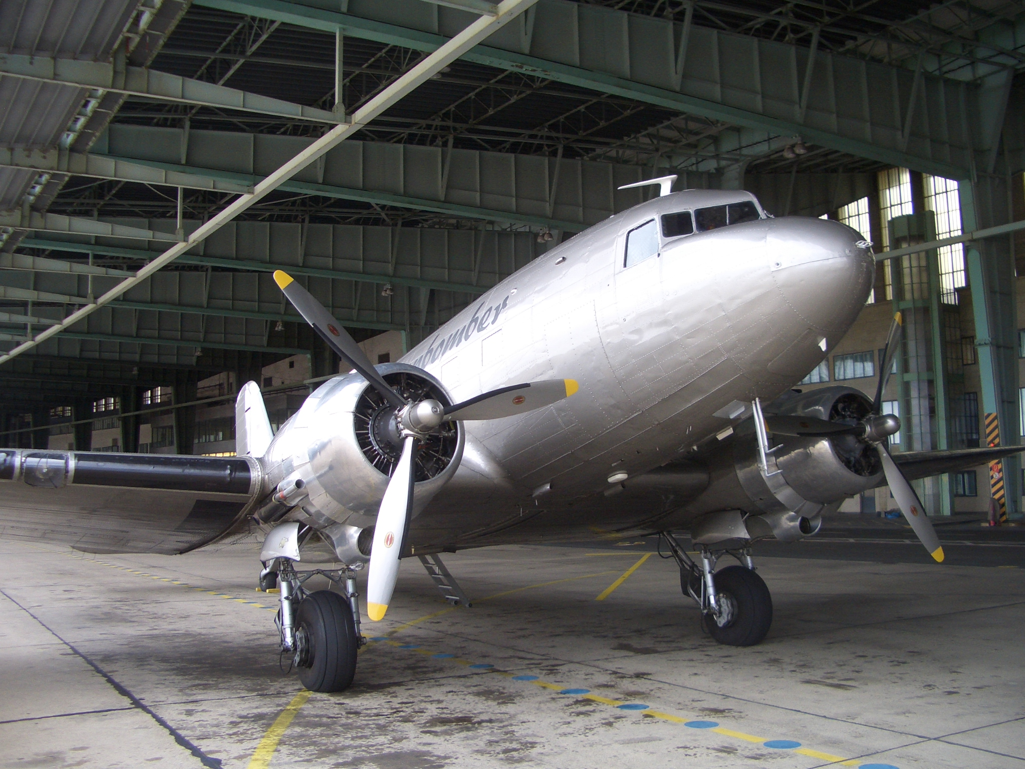 Douglas DC-3 (D-CXXX), eingesetzt für Rundflüge im restaurierten "Rosinenbomber", Standort Berlin-Tempelhof, September 2006